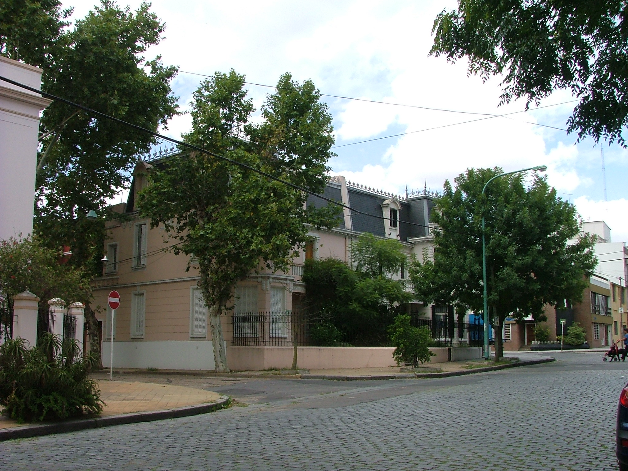 Casa del poeta Baldomero Fernández Moreno en la intersección de las calles Bilbao y Rivera Indarte, en el barrio de Flores.